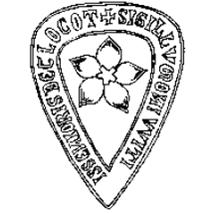 Pečať Vítka z Klokot (1250)